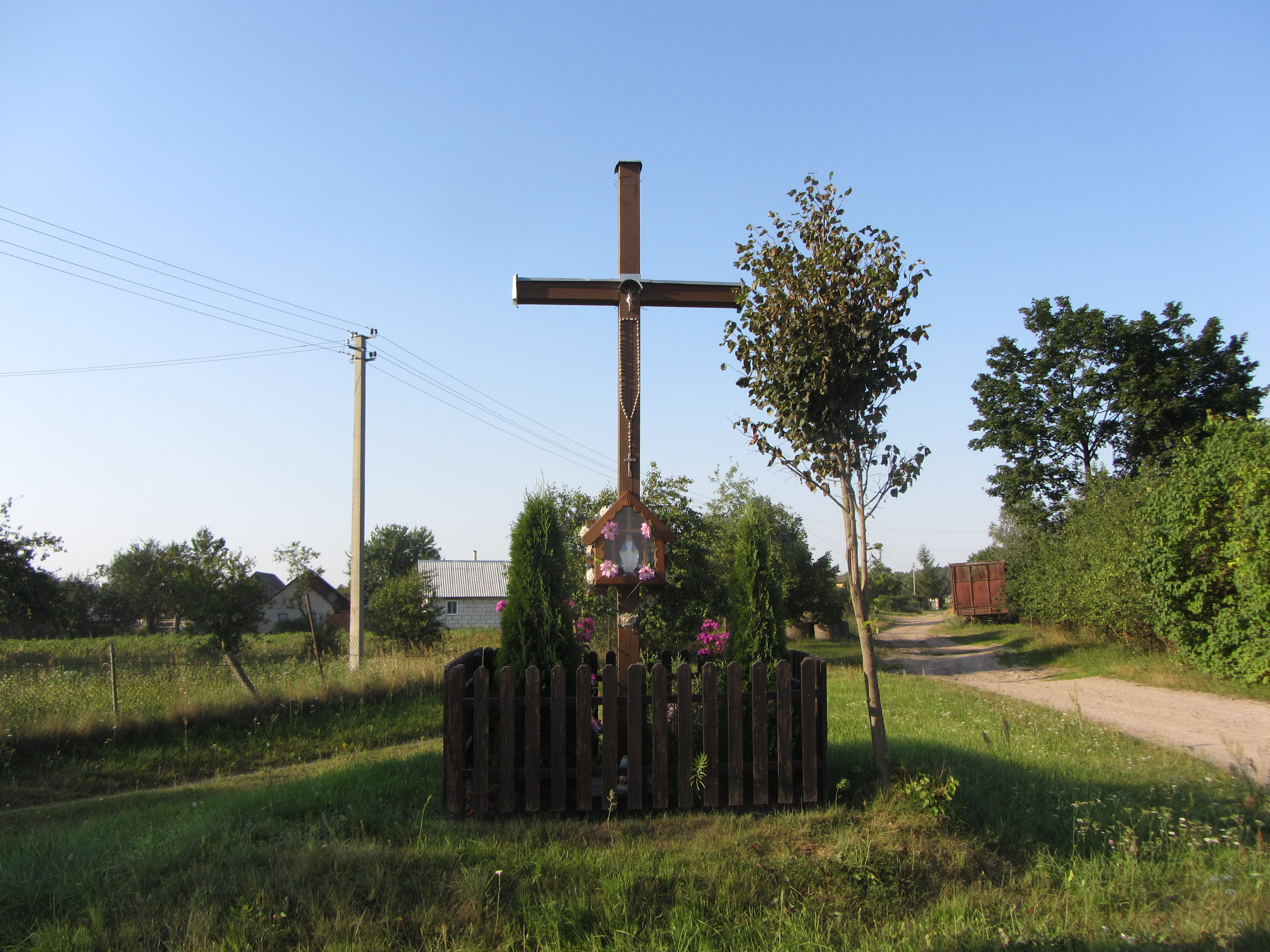 Naujasėdžiai 17270, Lithuania